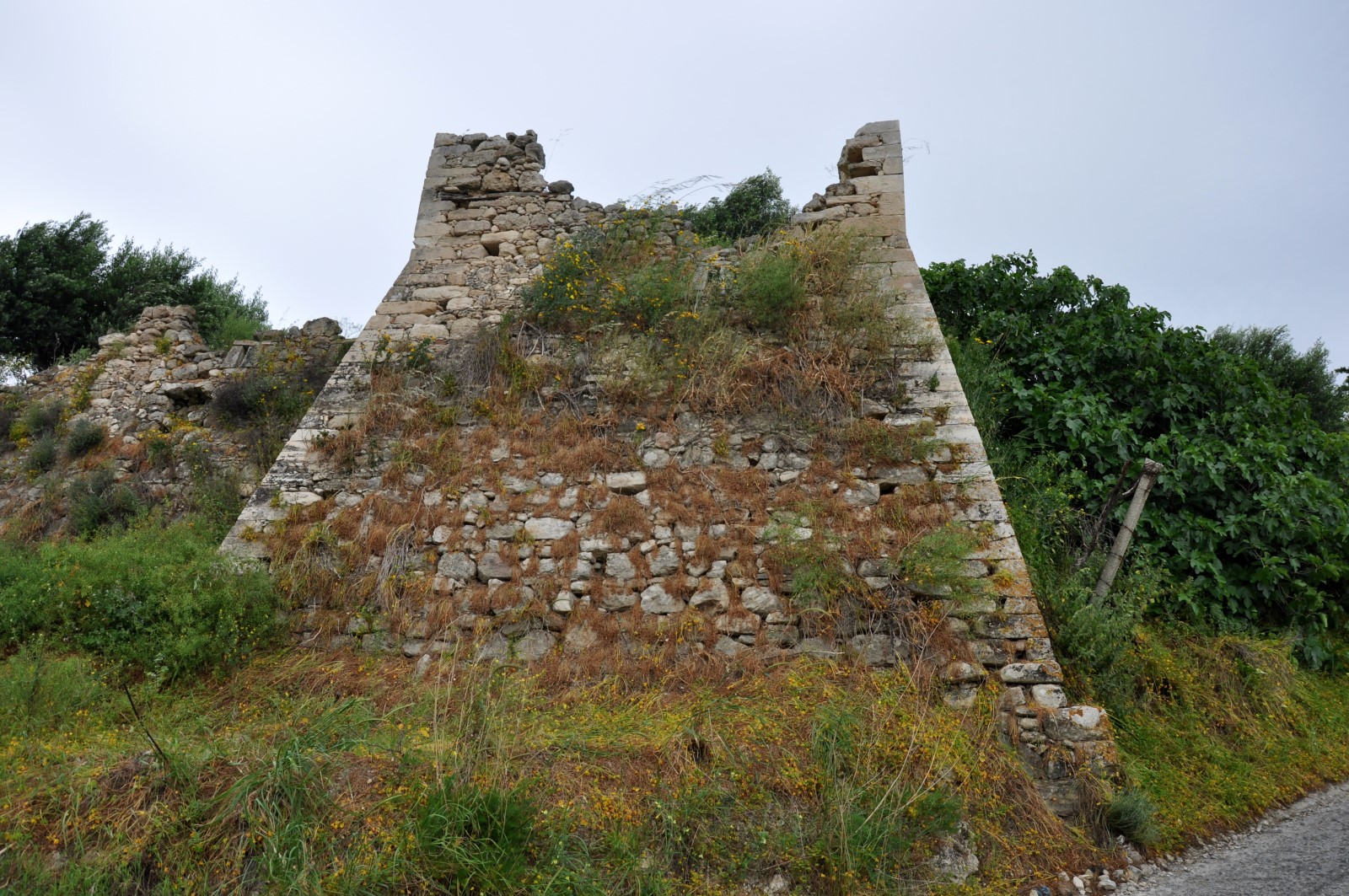 Ερείπια του Πύργου του Στεριανού στις Βασιλειές Τεμένους